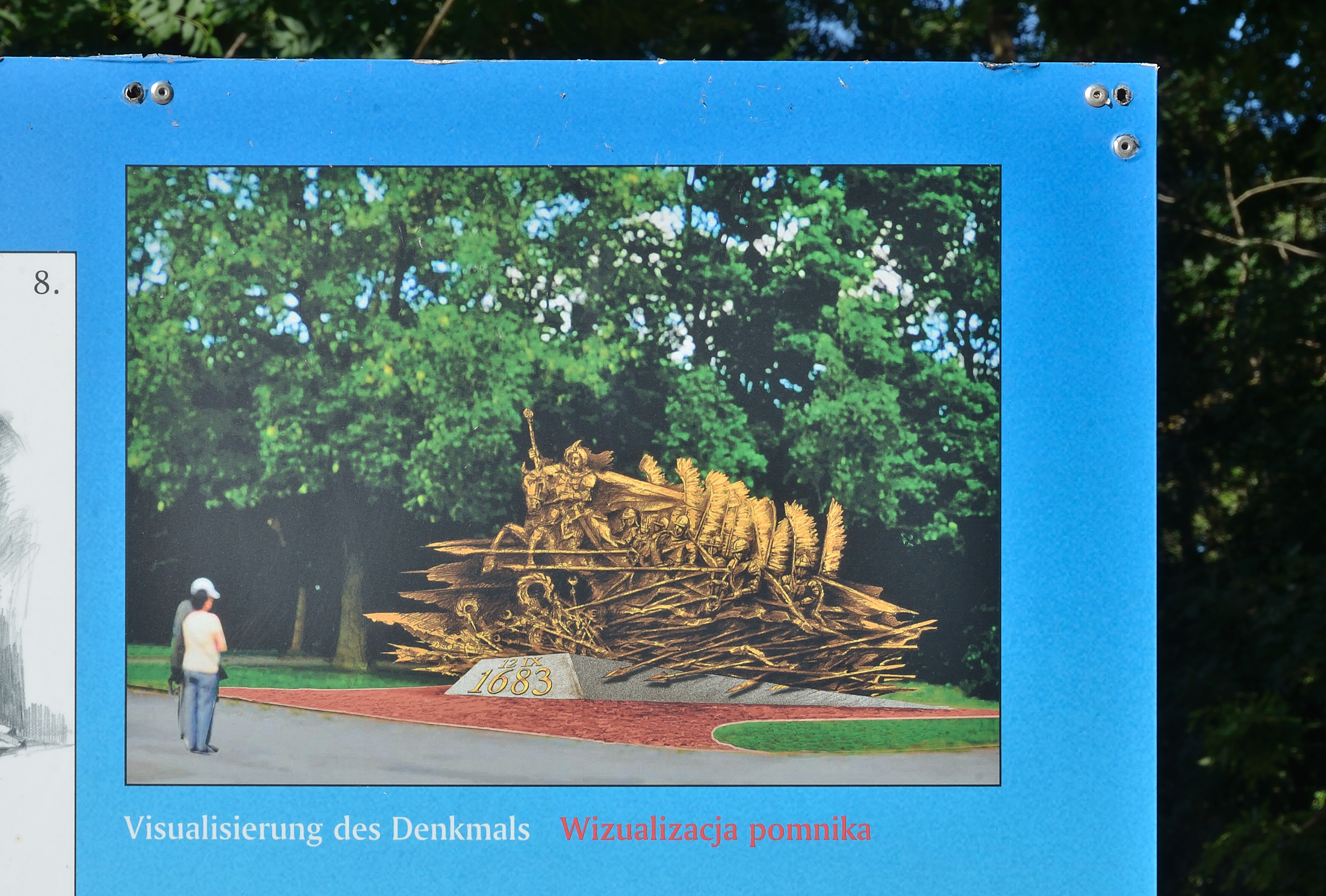 Das auf dem Kahlenberg geplante Monument für Jan III Sobieski. Denkmal-Modell und Realisation - Künstler und Bildhauer Professor Czesław Dźwigaj, Kraków, Polen • Stifter und Hersteller des Denkmalfundaments und des Platzes um das Denkmal - Bogdan Barzak • Ehrenschirmherrschaft - Präsident der Stadt Krakau Professor Jacek Majchrowski • Komitee zur Denkmalerrichtung: Vorsitzender - Pjotr Zapart …